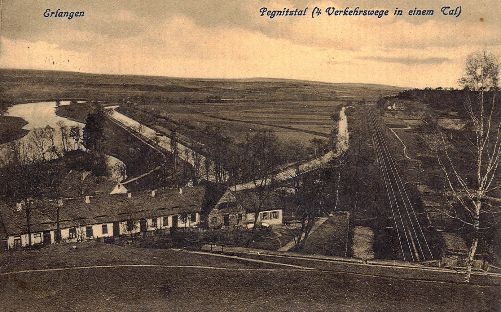 4 Verkehrswege im Regnitztal bei Erlangen. Regnitz, Ludwig-Donau-Main-Kanal, Straße, Ludwig-Süd-Nord-Bahn.